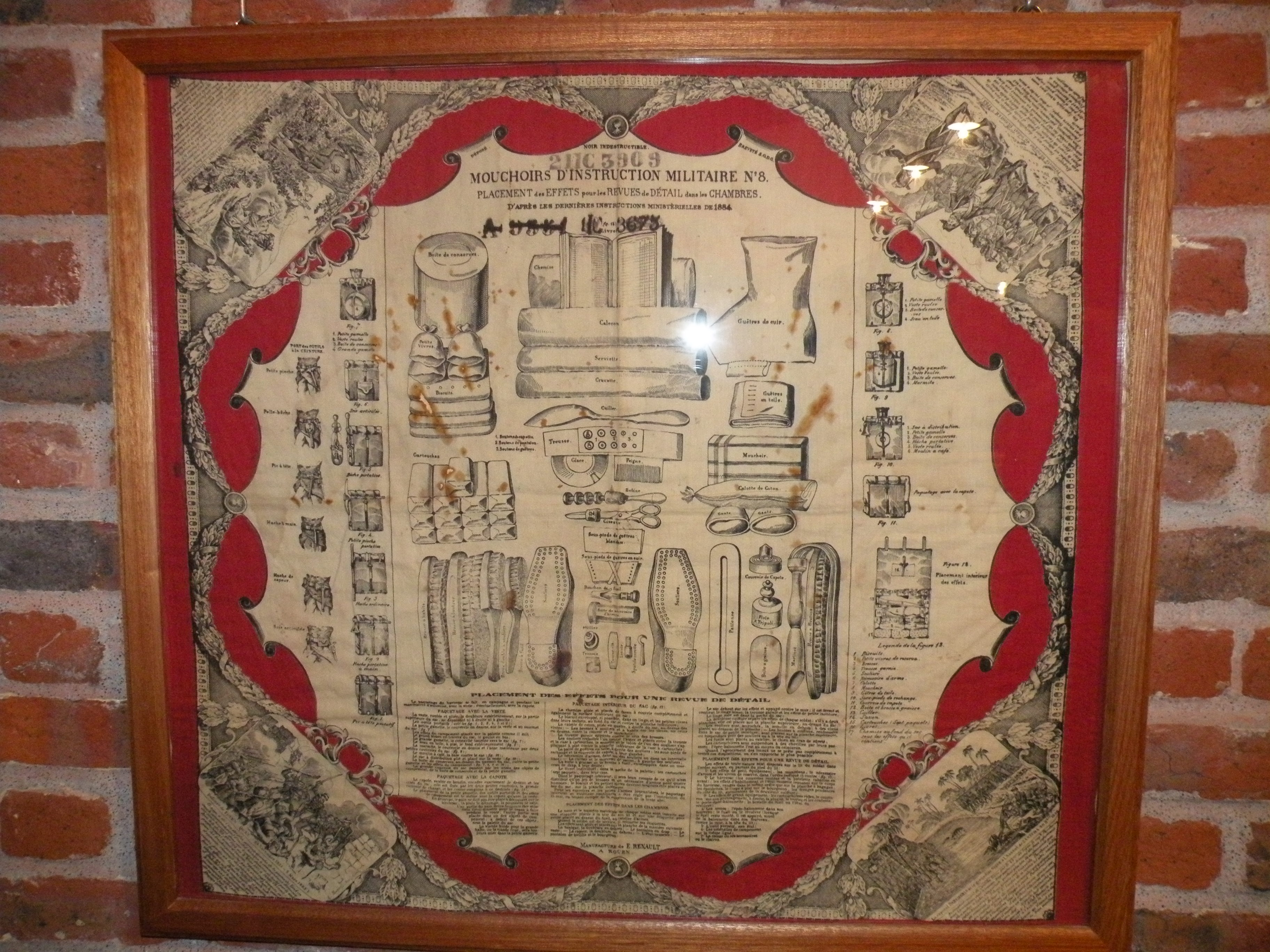 Collection du Fort de Leveau